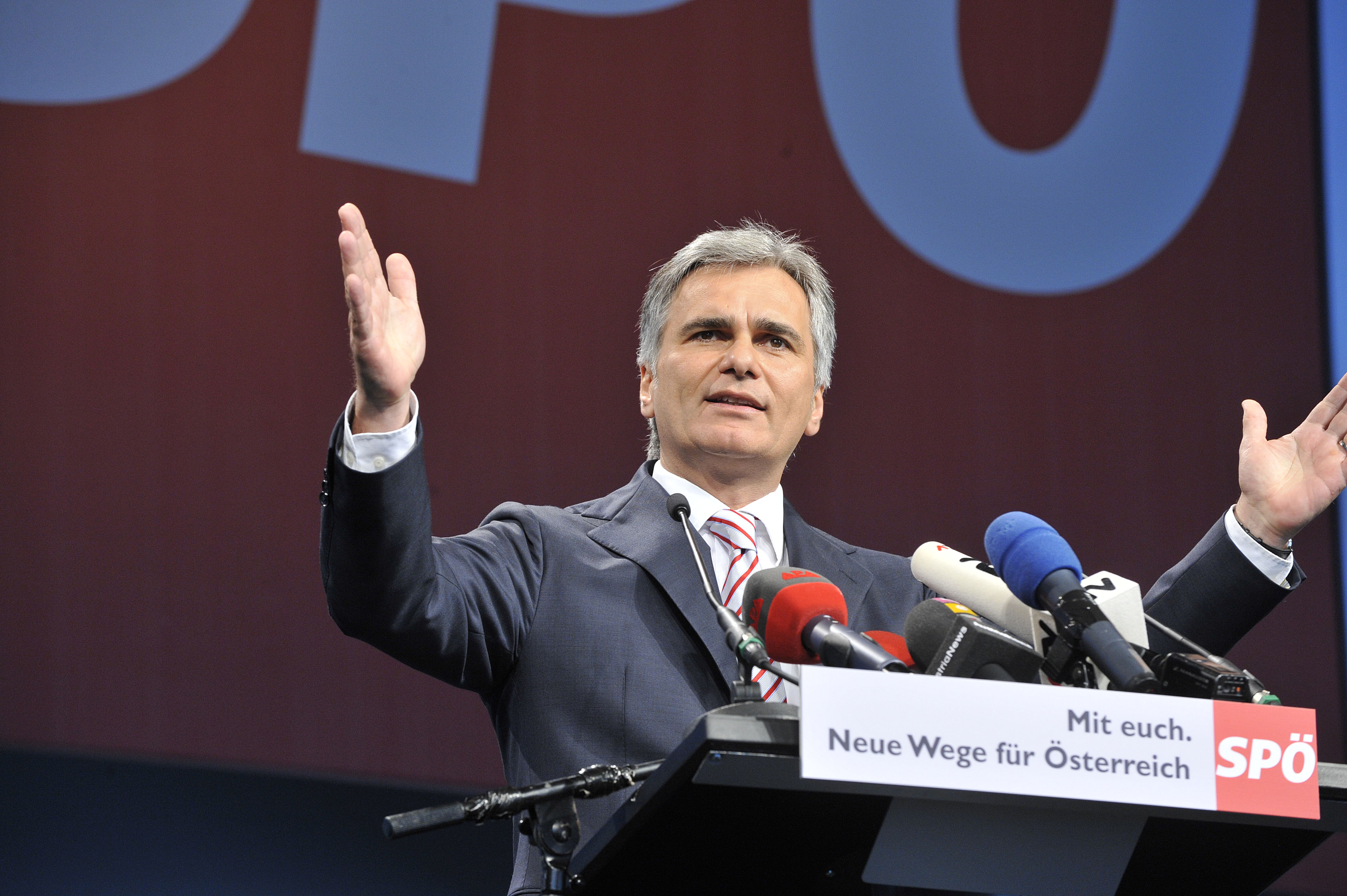 Sozial. Entschlossen. Zuverlässig. 40. Ordentlicher Bundesparteitag 2008 im Linzer Design-Center. Foto: Johannes Zinner.